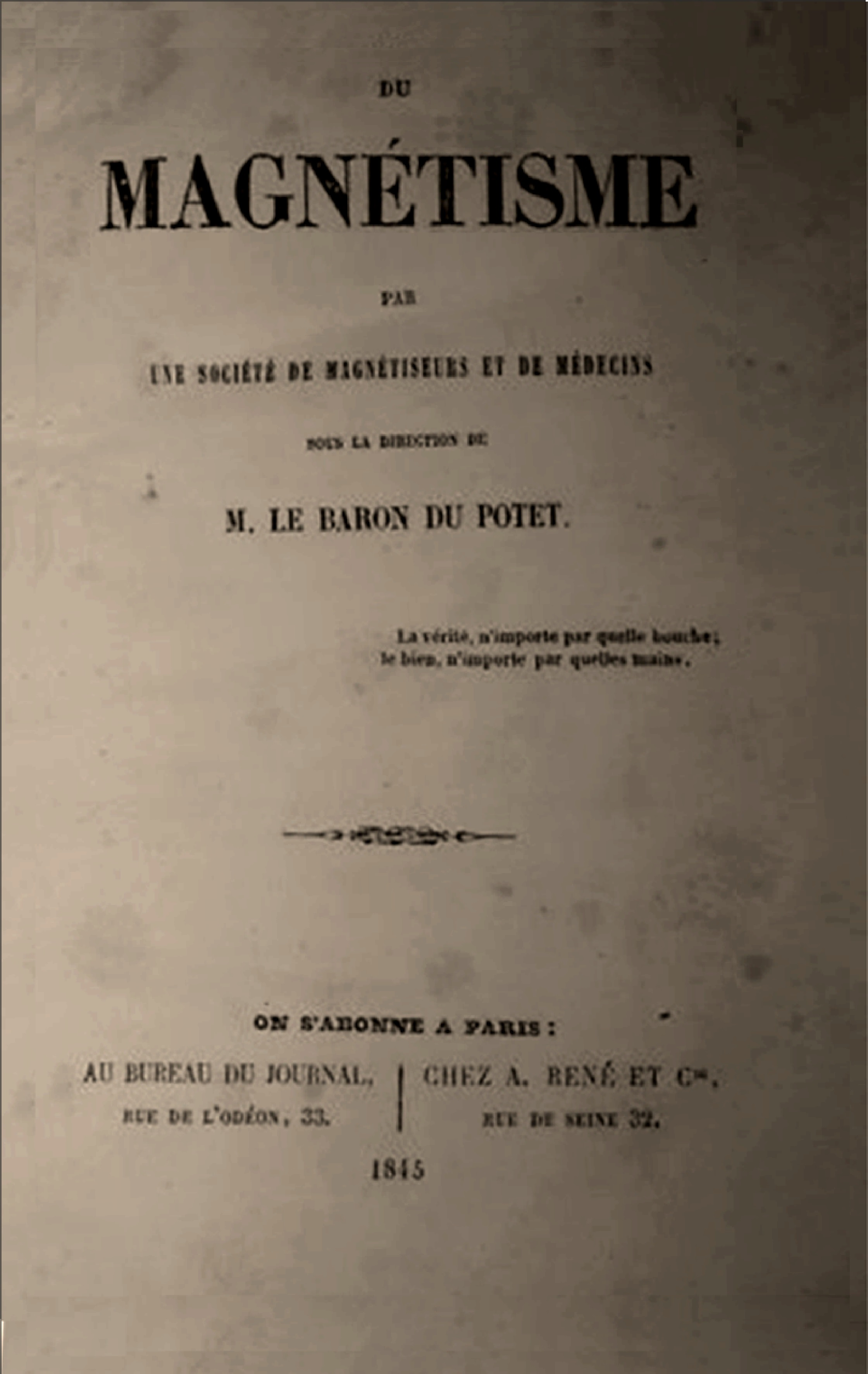 Português do Brasil: Jornal do Magnetismo